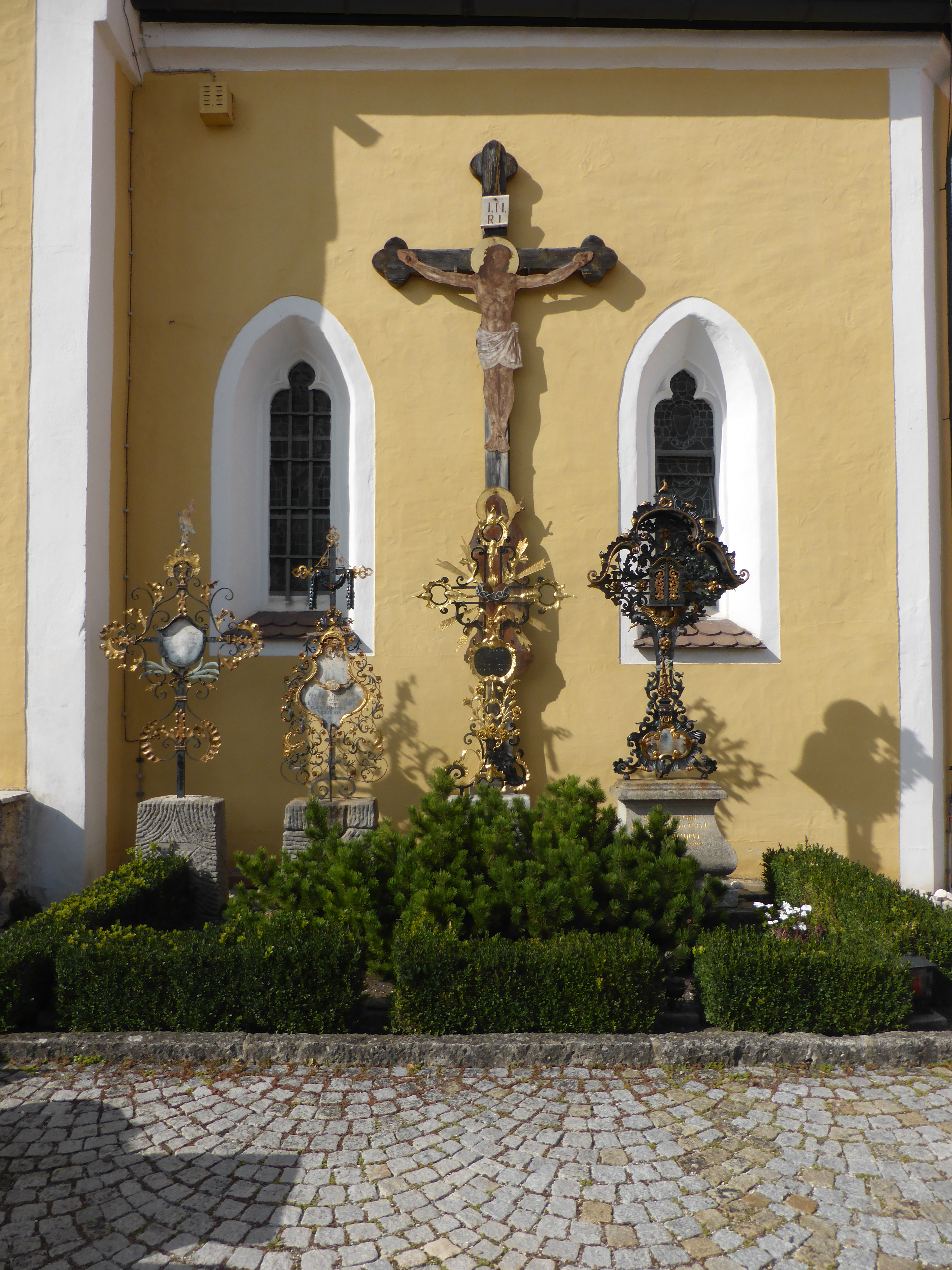 Kirche Mariä Geburt (Frauenberg) bei Brunn (Oberpfalz)